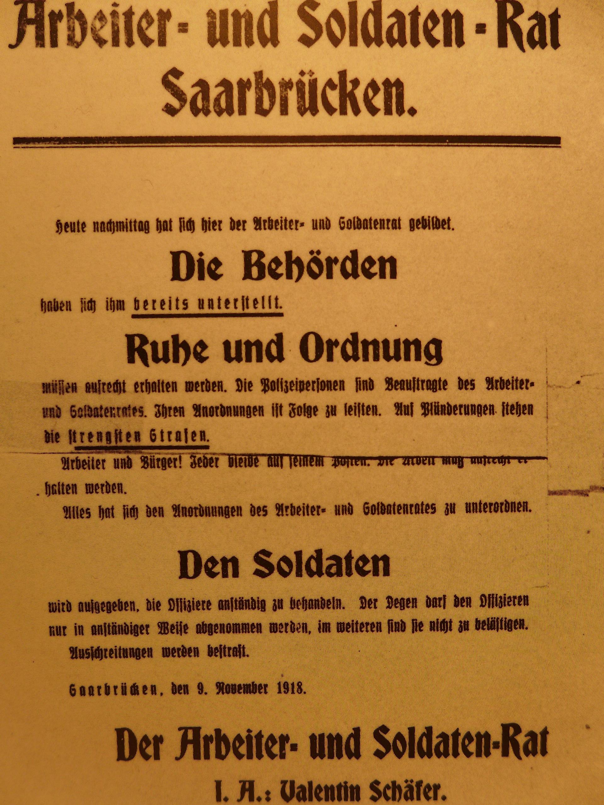 Saarbrücken, Bekanntmachung des Arbeiter- und Soldatenrates vom 9. November 1918, (Stadtarchiv Saarbrücken)